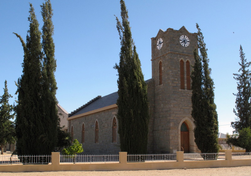 Pofadder DRC church